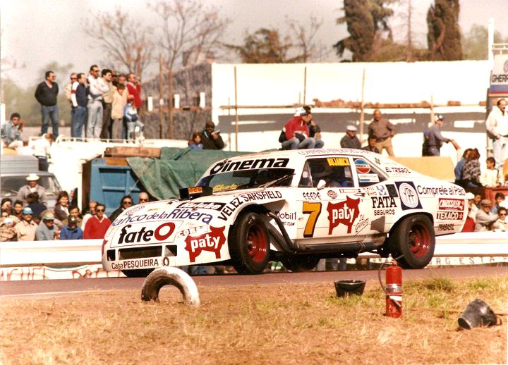 Osvaldo Morresi conduciendo su Chevy de Turismo Carretera, en 1989.